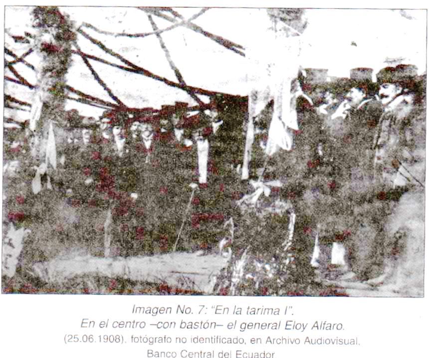 Junto a ALfaro